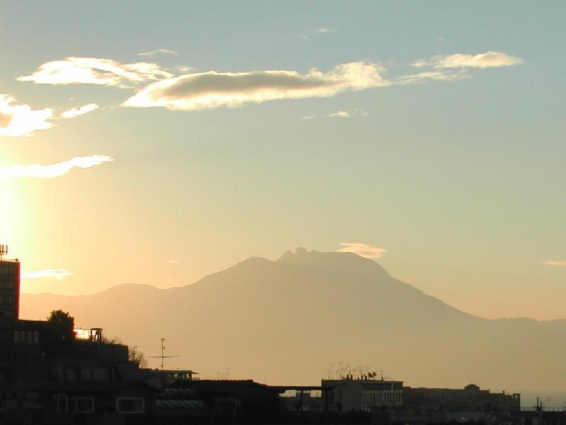 Napoli, Monte Faito all'alba by Lalupa